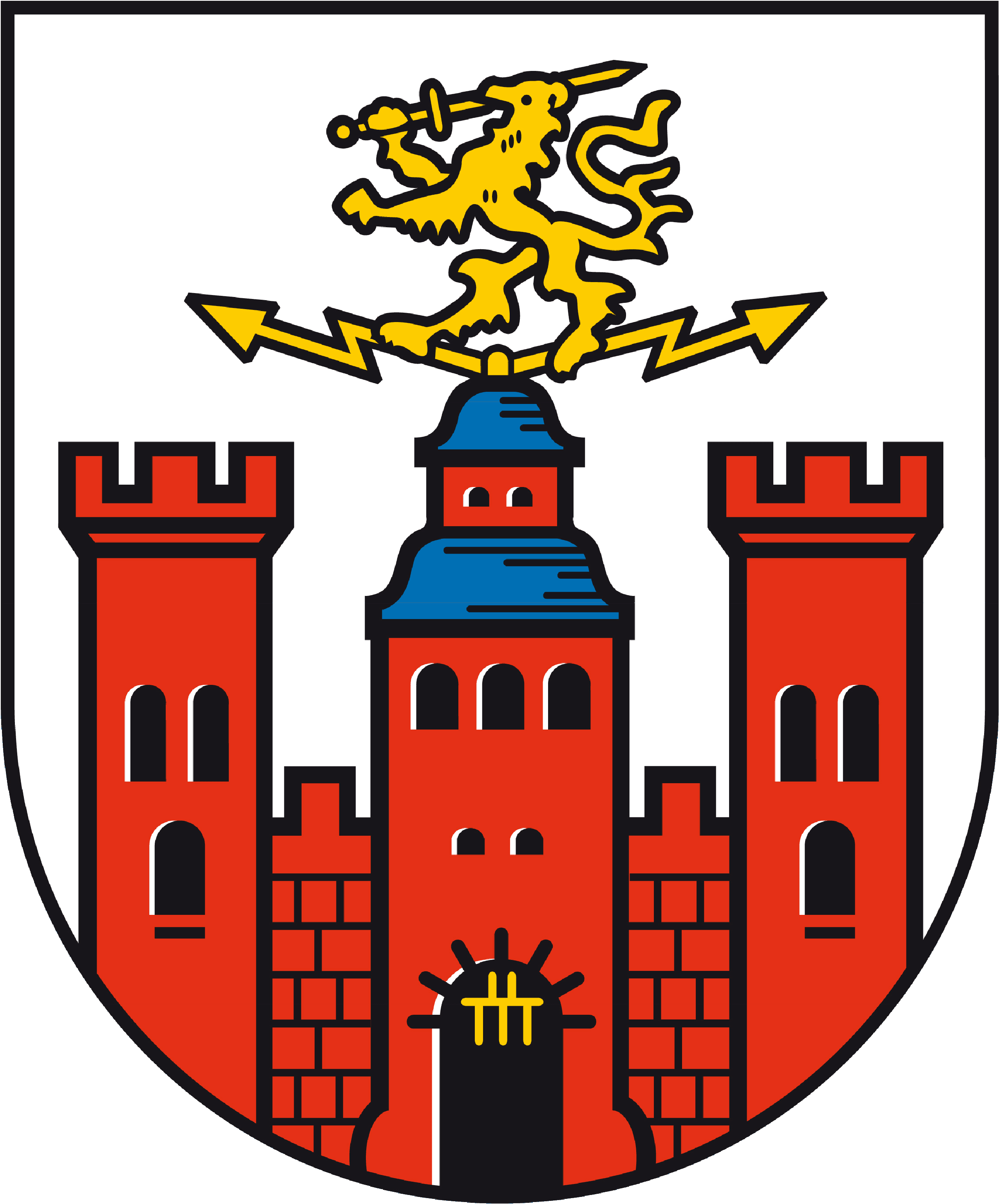 Wappen der Stadt Pirmasens